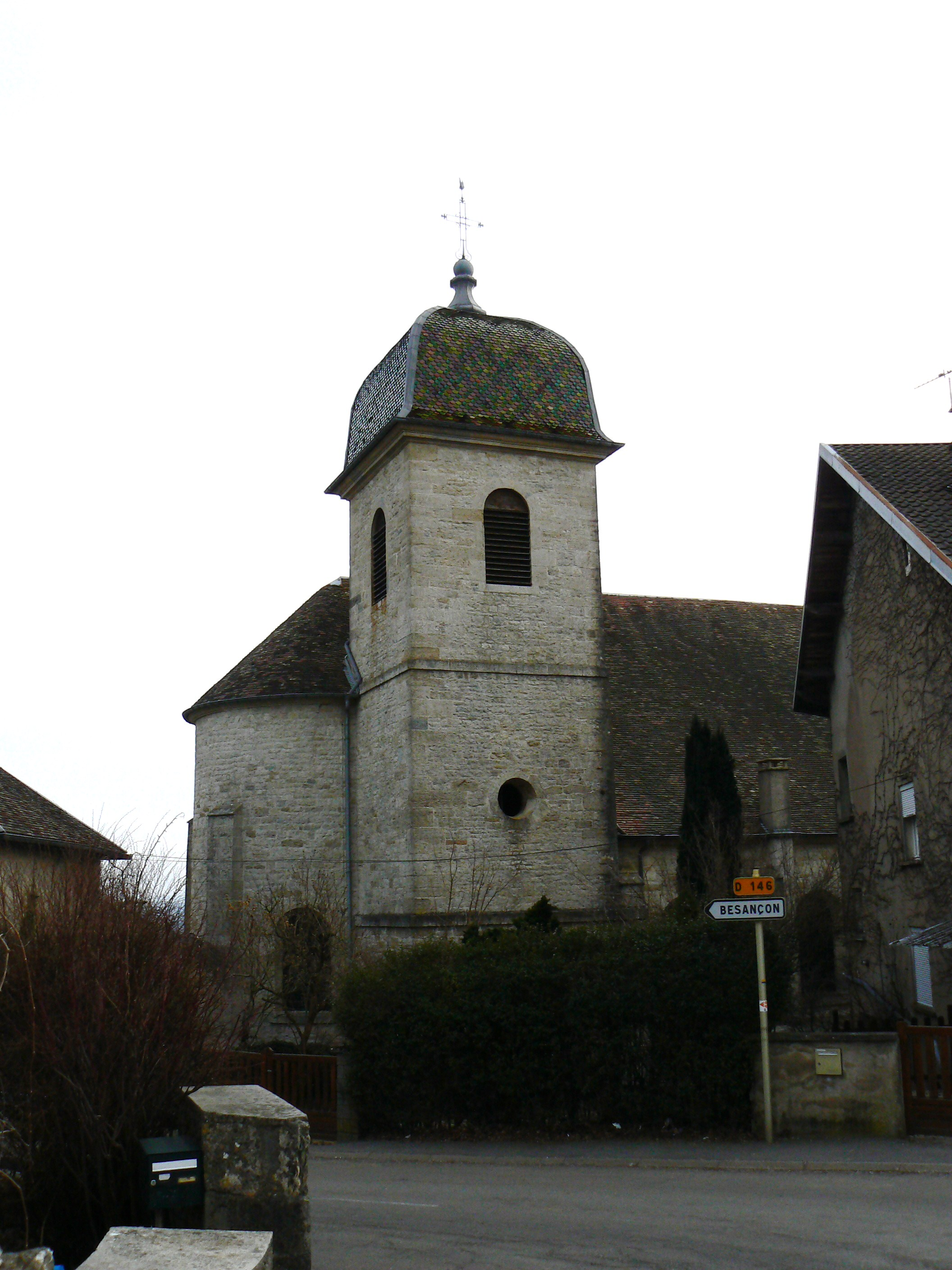 Eglise de Monfaucon